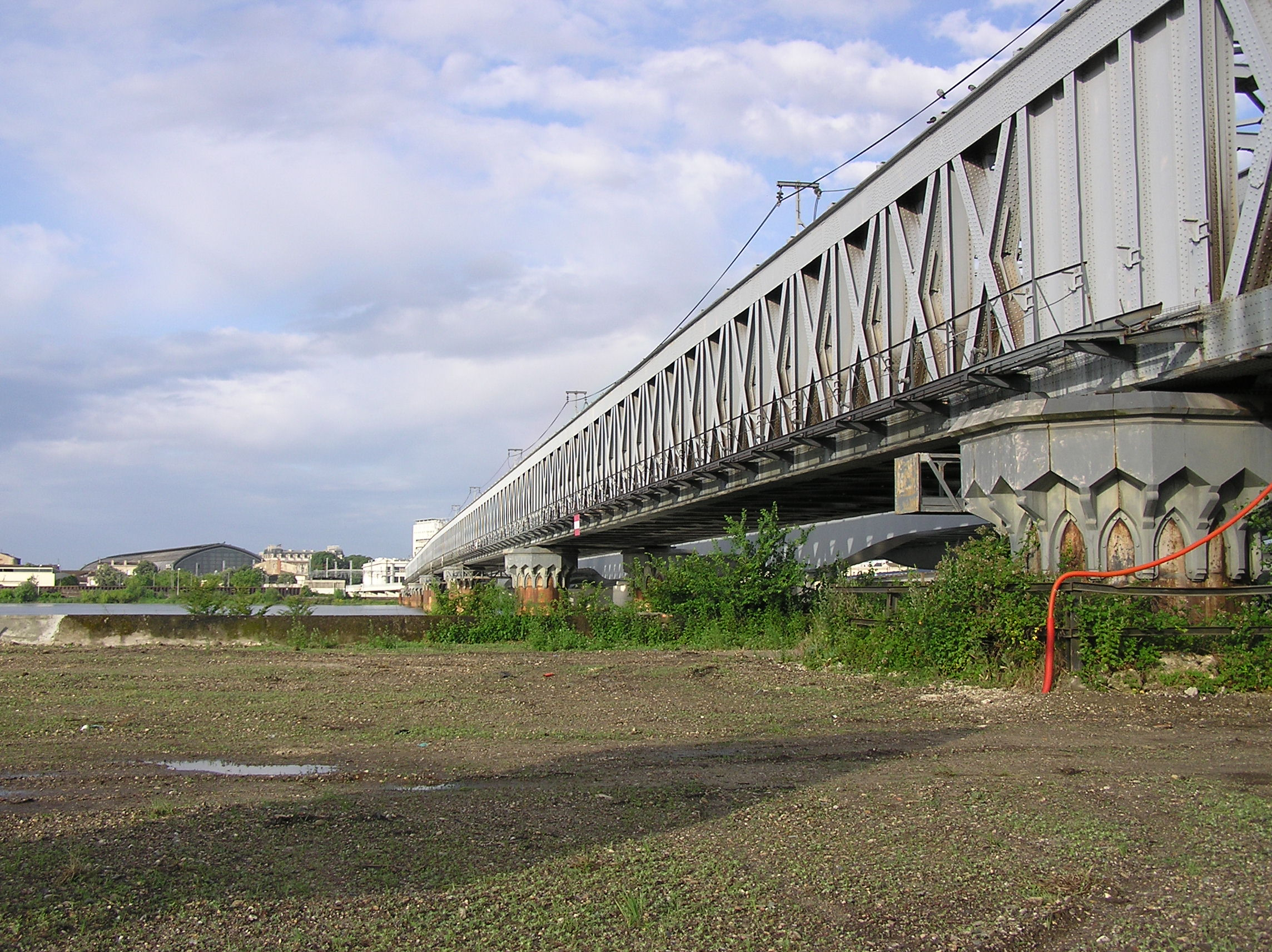 La passerelle Eiffel à Bordeaux en juin 2009